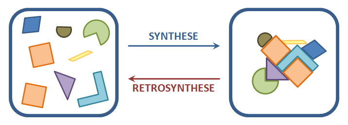 Retrosynthetische analyse schematisch voorgesteld